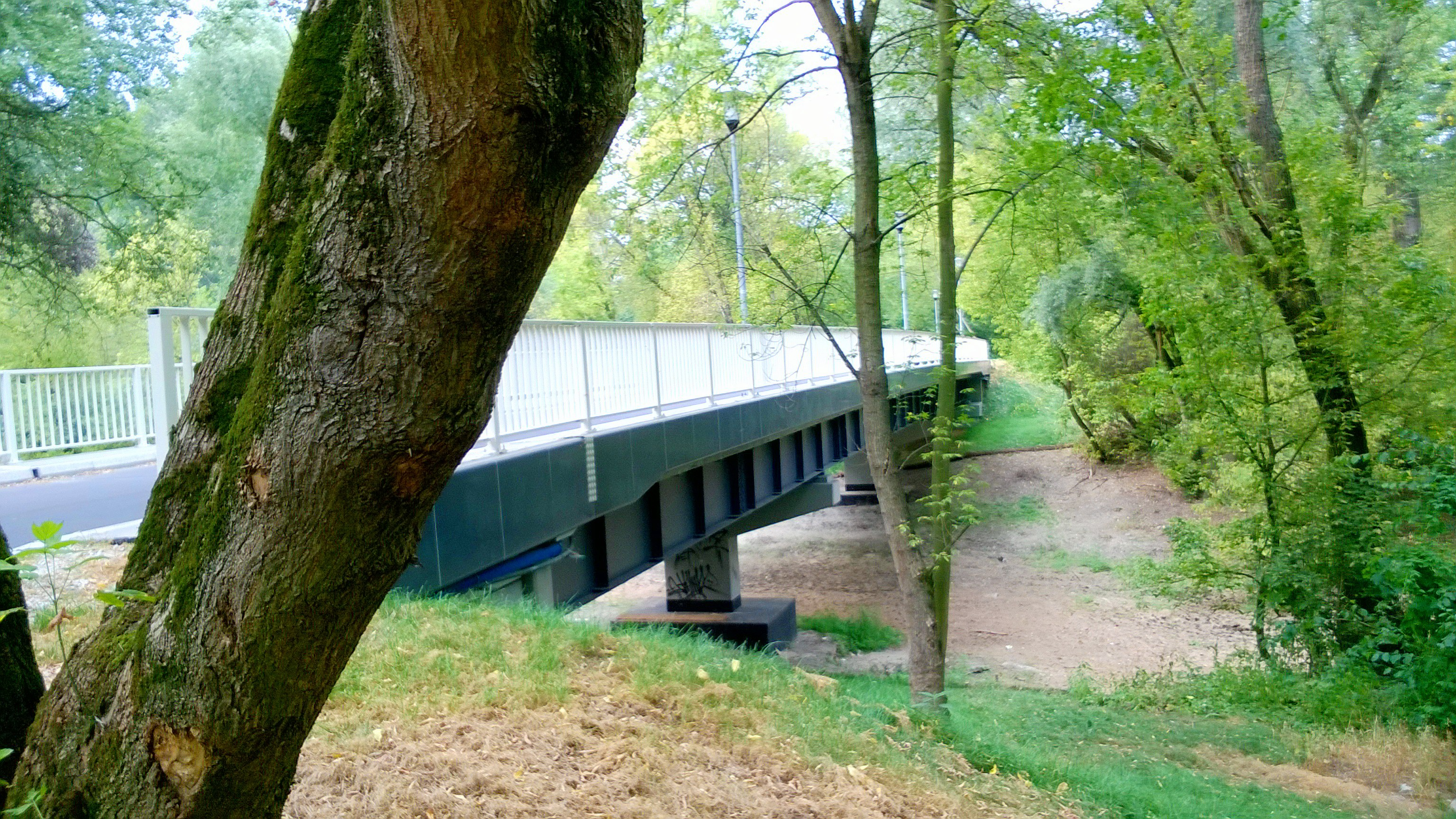 Kępa Bazarowa w Toruniu8